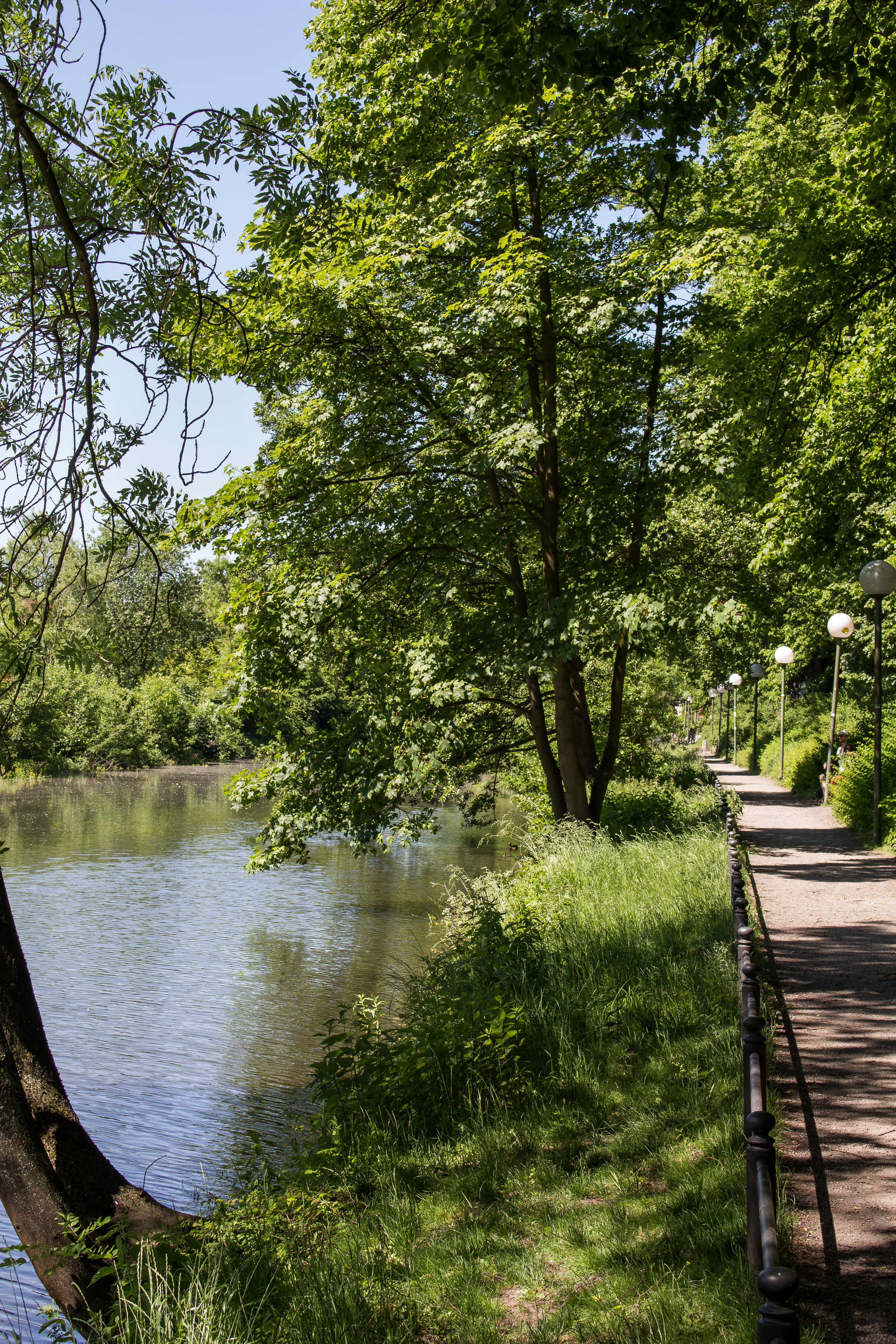 Bäume am Herrenteichswall ND-OS-S 04 Fussweg an der Hase in Osnabrück. Naturdenkmal in Osnabrück Kontakt